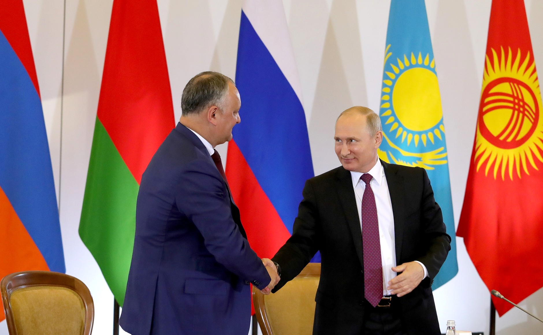 Встреча Президента России Владимира Путина с Президентом Республики Молдова Игорем Додоном